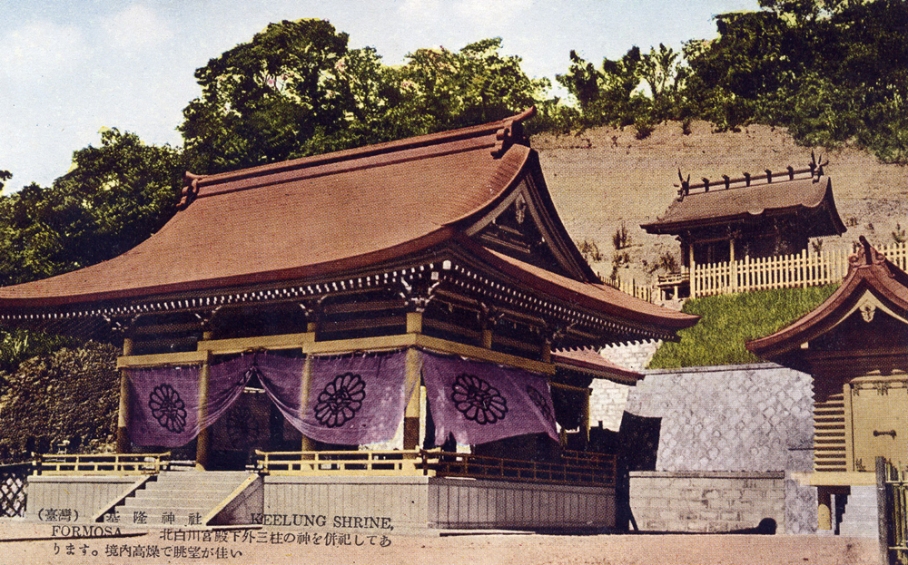 中文（台灣）: 台灣基隆神社，攝於1937年